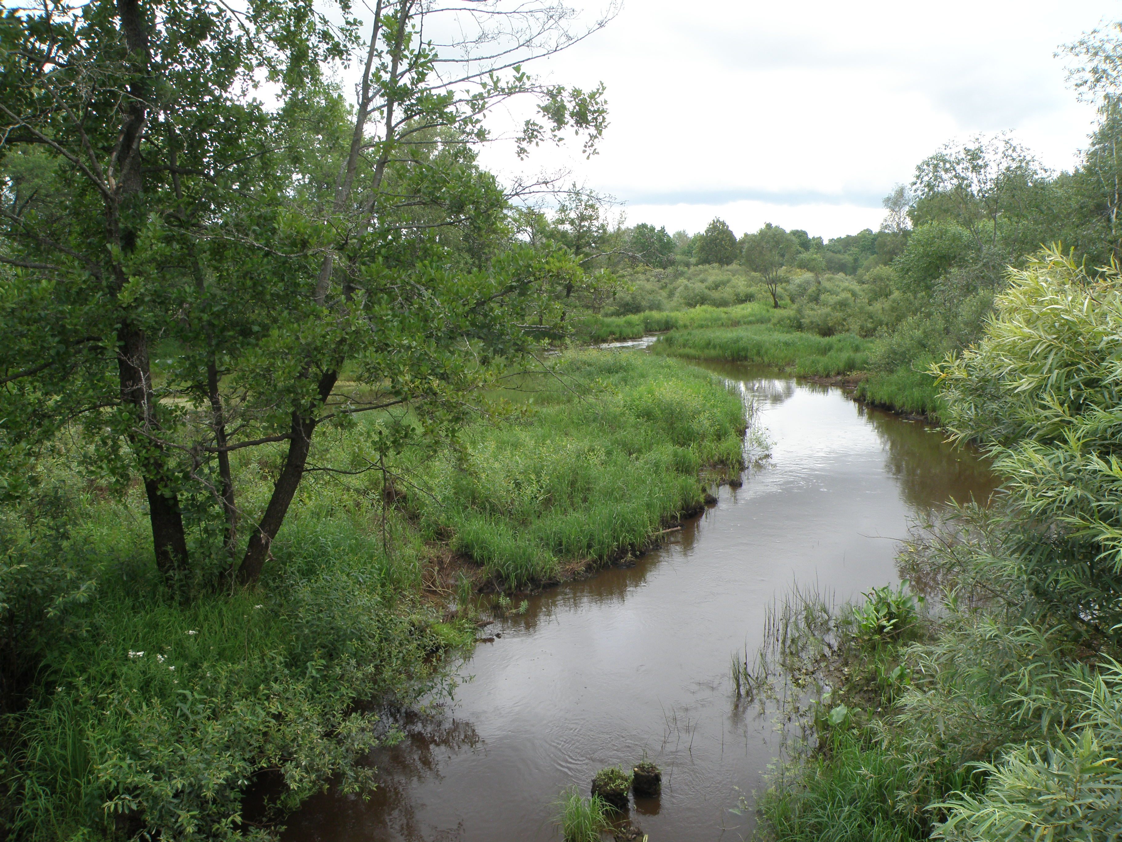 Сеньга близ устья, выше моста